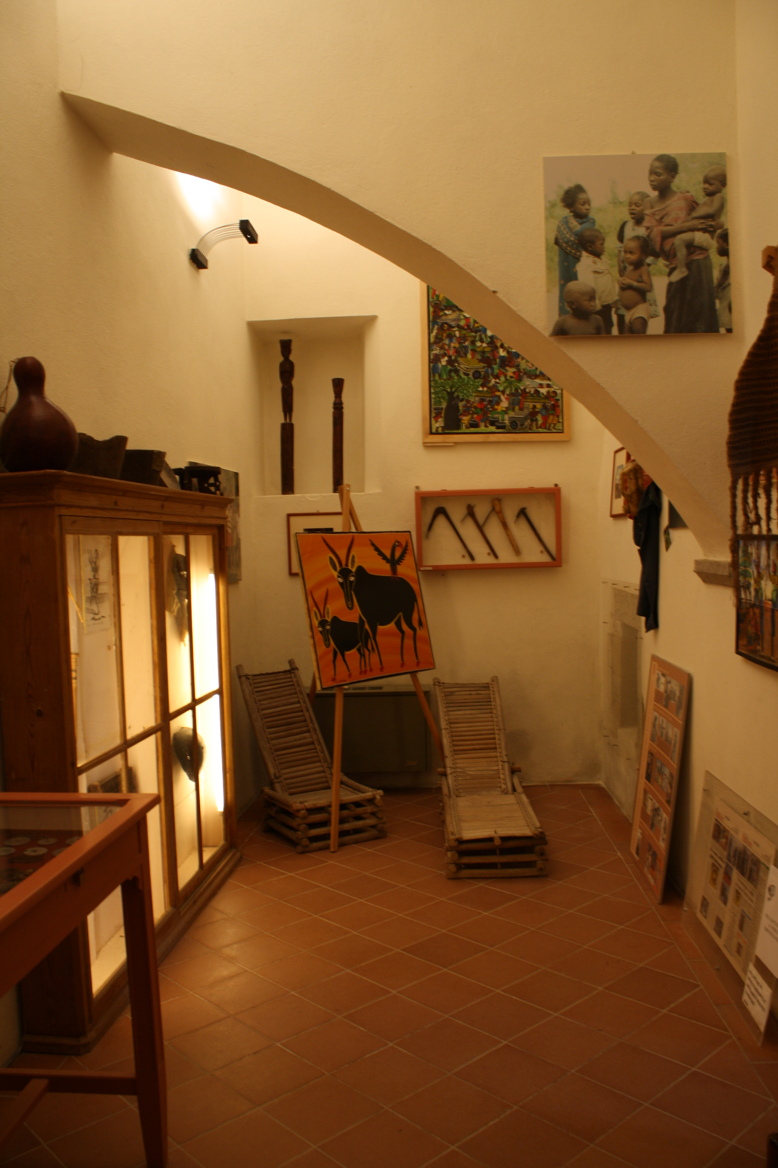 Museo Etnografico "Il Tamburo Parlante"